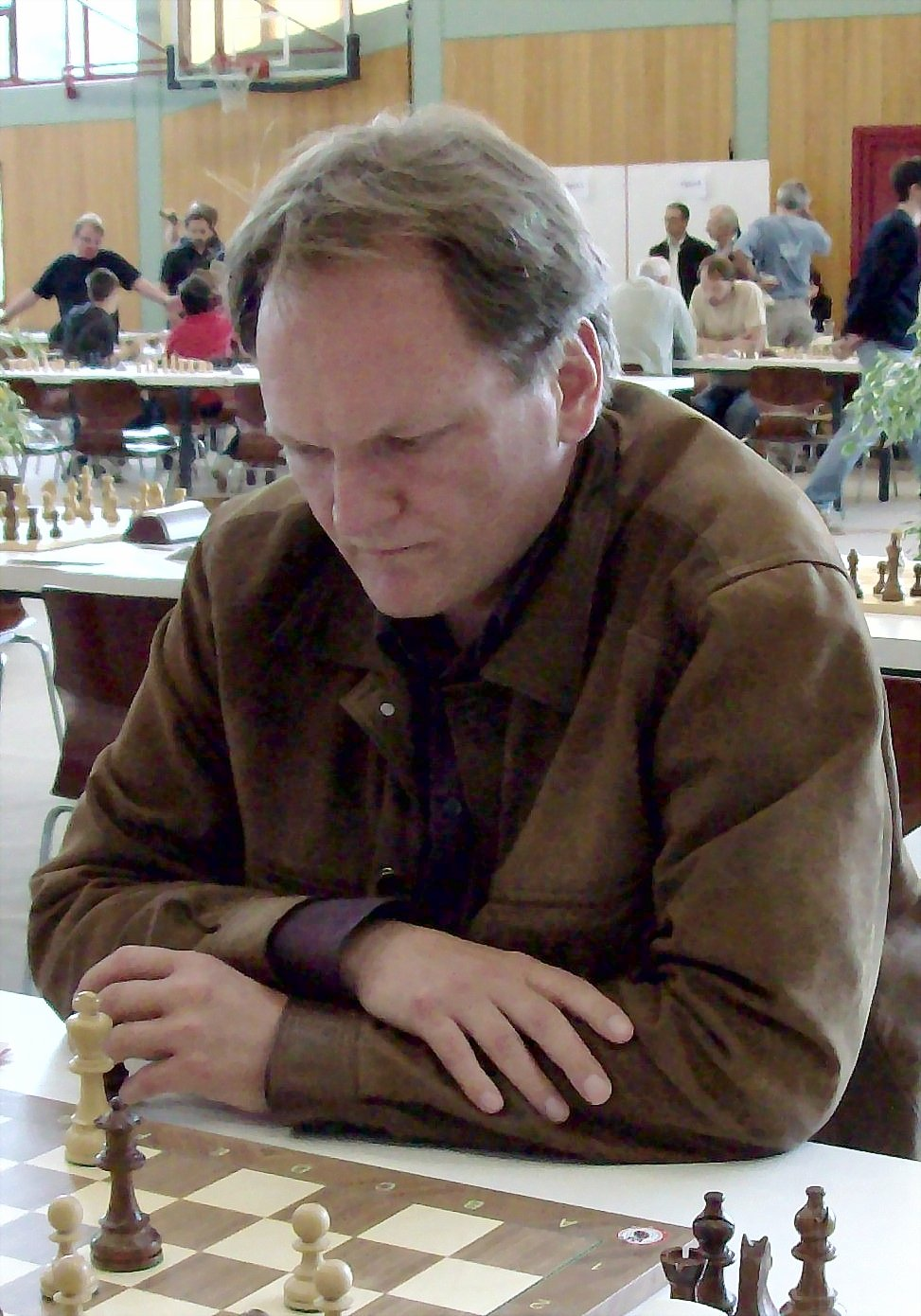 Henrik Danielsen, chess grandmaster from Iceland